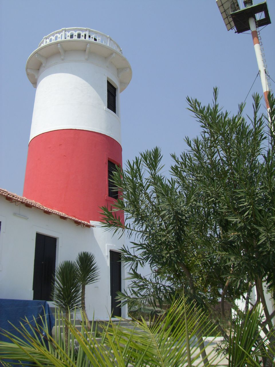 Lobito Lighthouse, Lobito, Angola